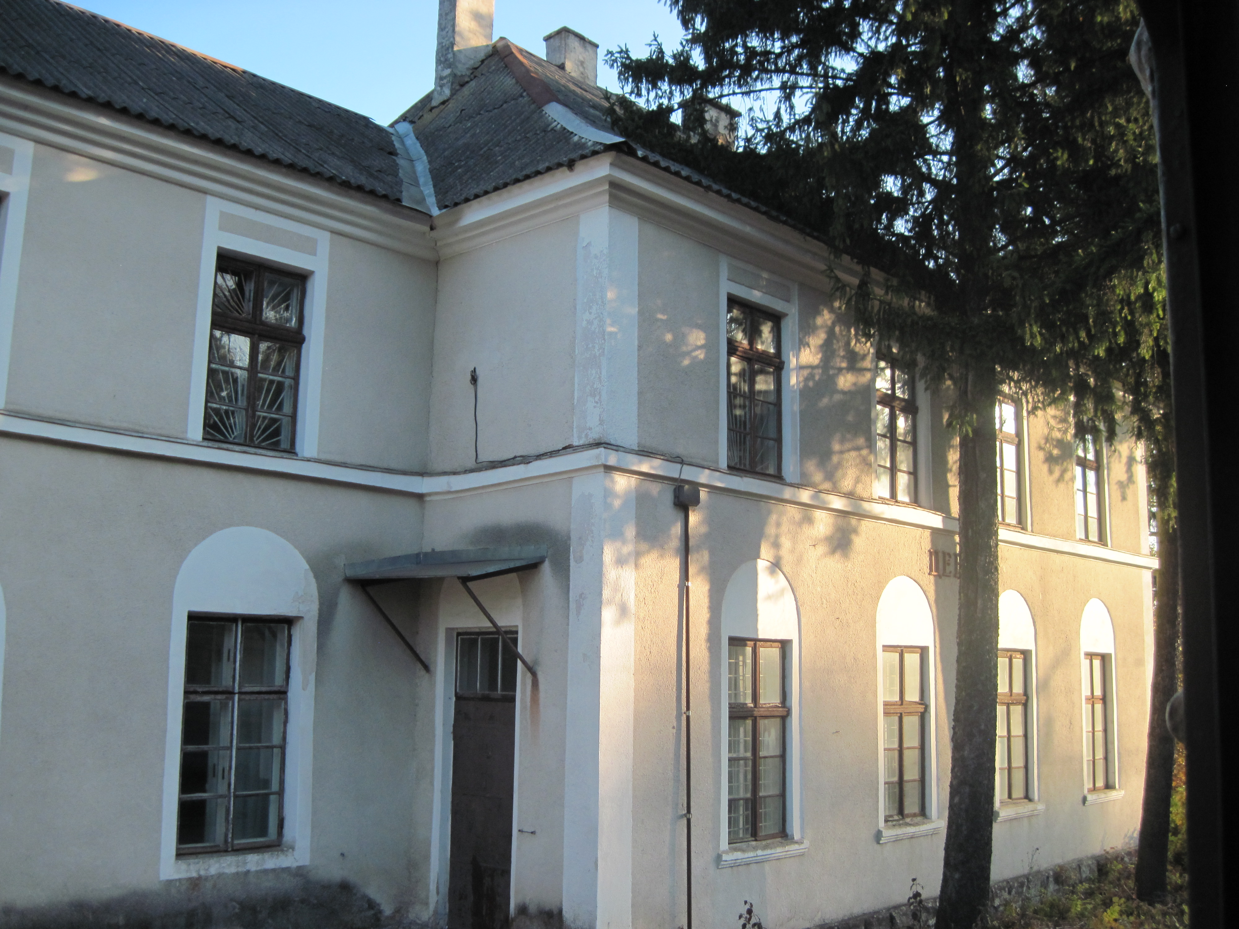 Станція Цебрів, осінь 2014